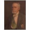 Pintura de Rafael Puig i Valls